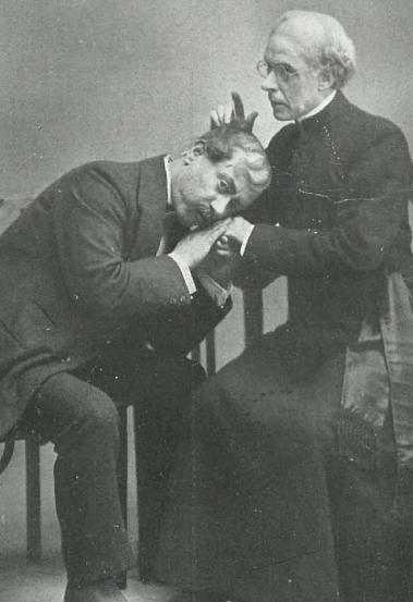 Los actores españoles Ernesto Vilches y José Santiago en una escena de la obra de teatro Genio y figura, de Carlos Arniches